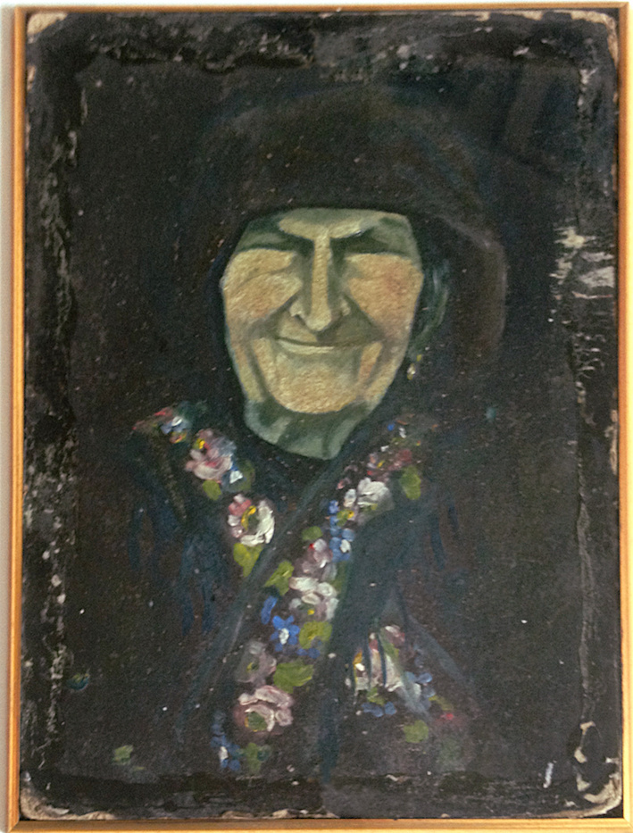 Mia nonna dipinto giovanile di Massimo Facchin. Olio su tavola eseguito con uno stecco. Anni trenta.